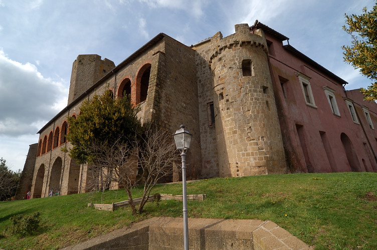 Rocca Farnese, Valentano (VT, Italy)